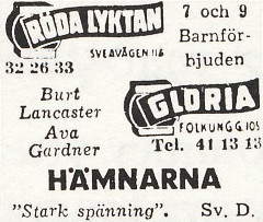 Biografannons för biografen "Gloria" och "Röda kvarn" i Stockholm lördagen den 20 november 1948 i Expressen